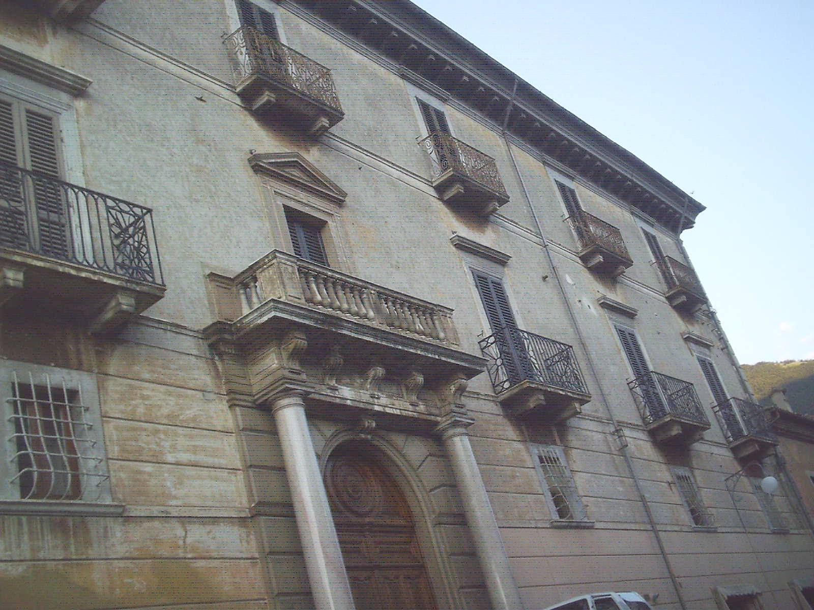 Palazzo di Rienzo sito a Scanno